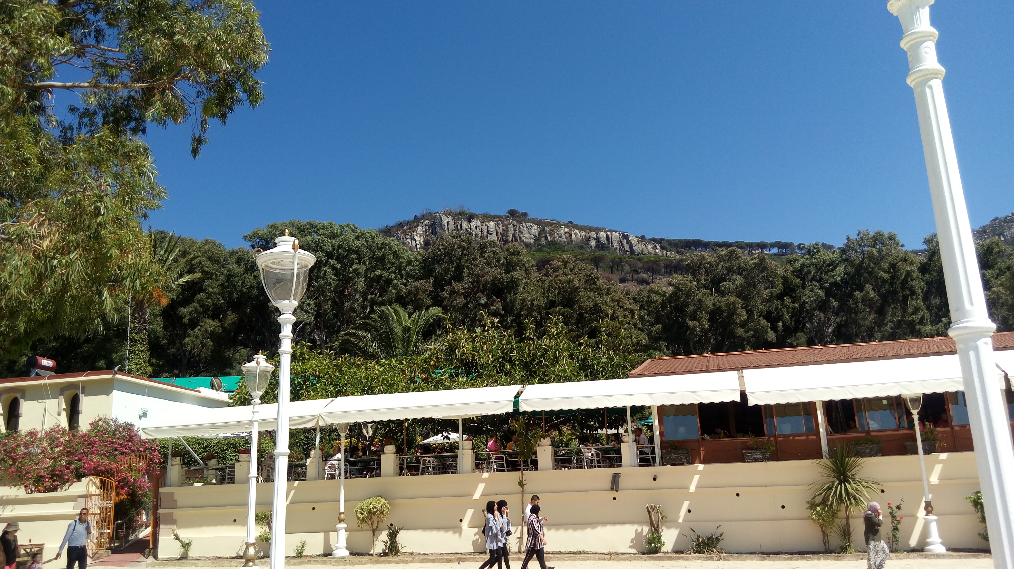 منظر لراس سبارطيل من الفوق